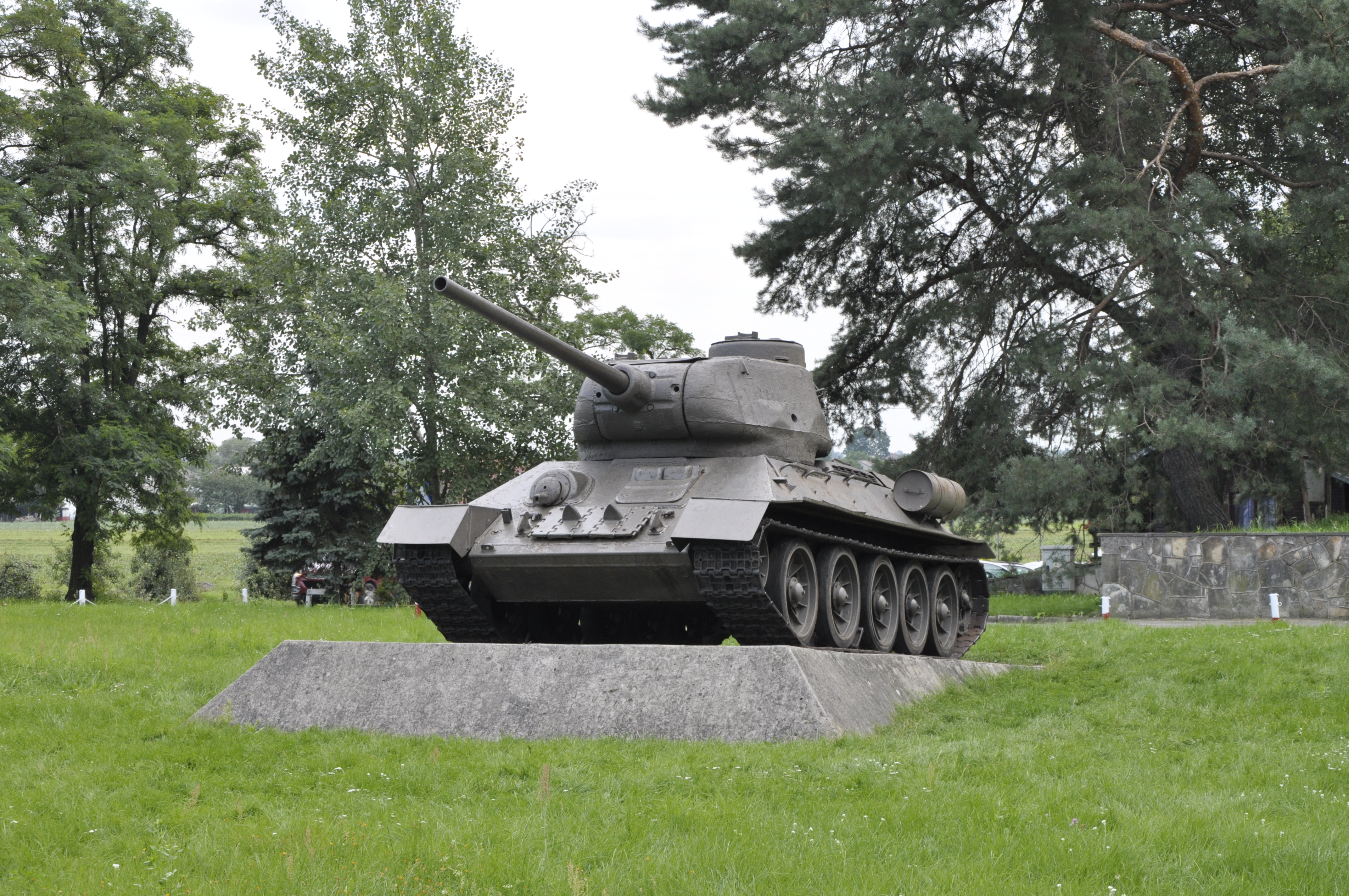 Skansen Bojowy 1 Armii Wojska Polskiego w Mniszewie